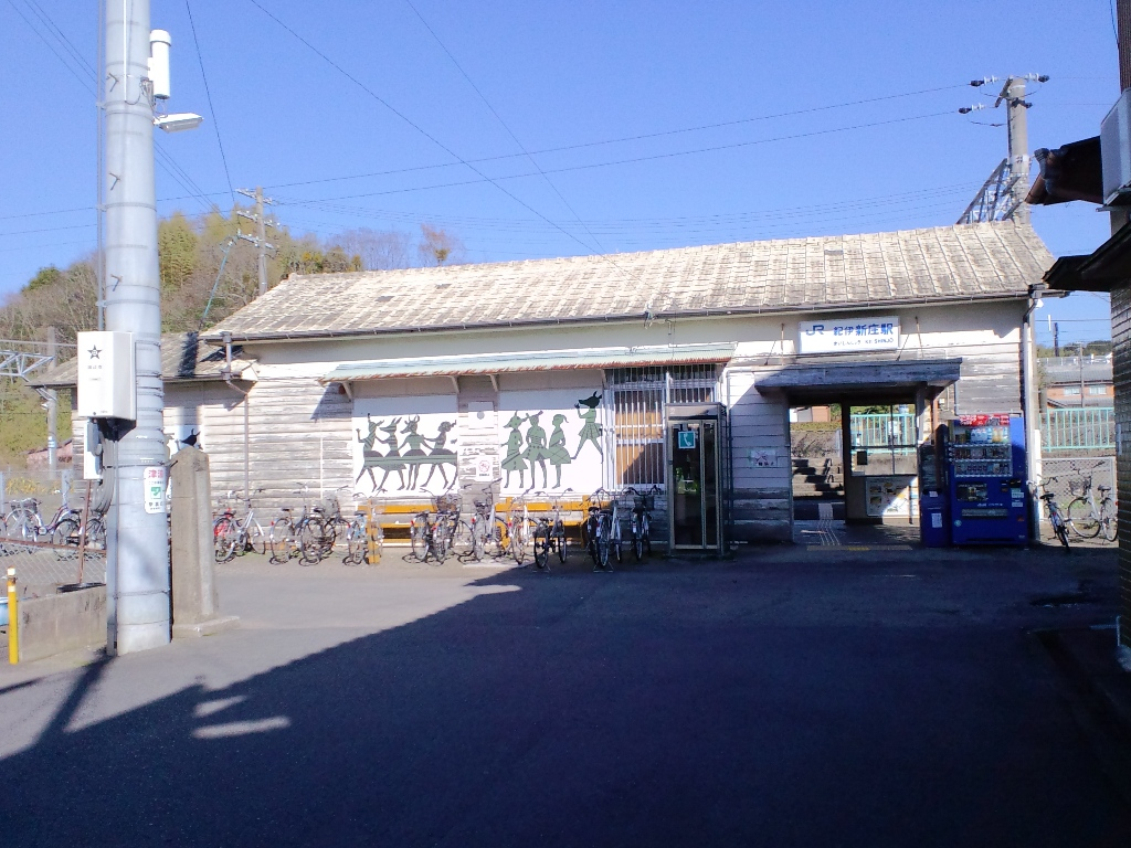 JR西日本・紀伊新庄駅外観（2016/12/31）